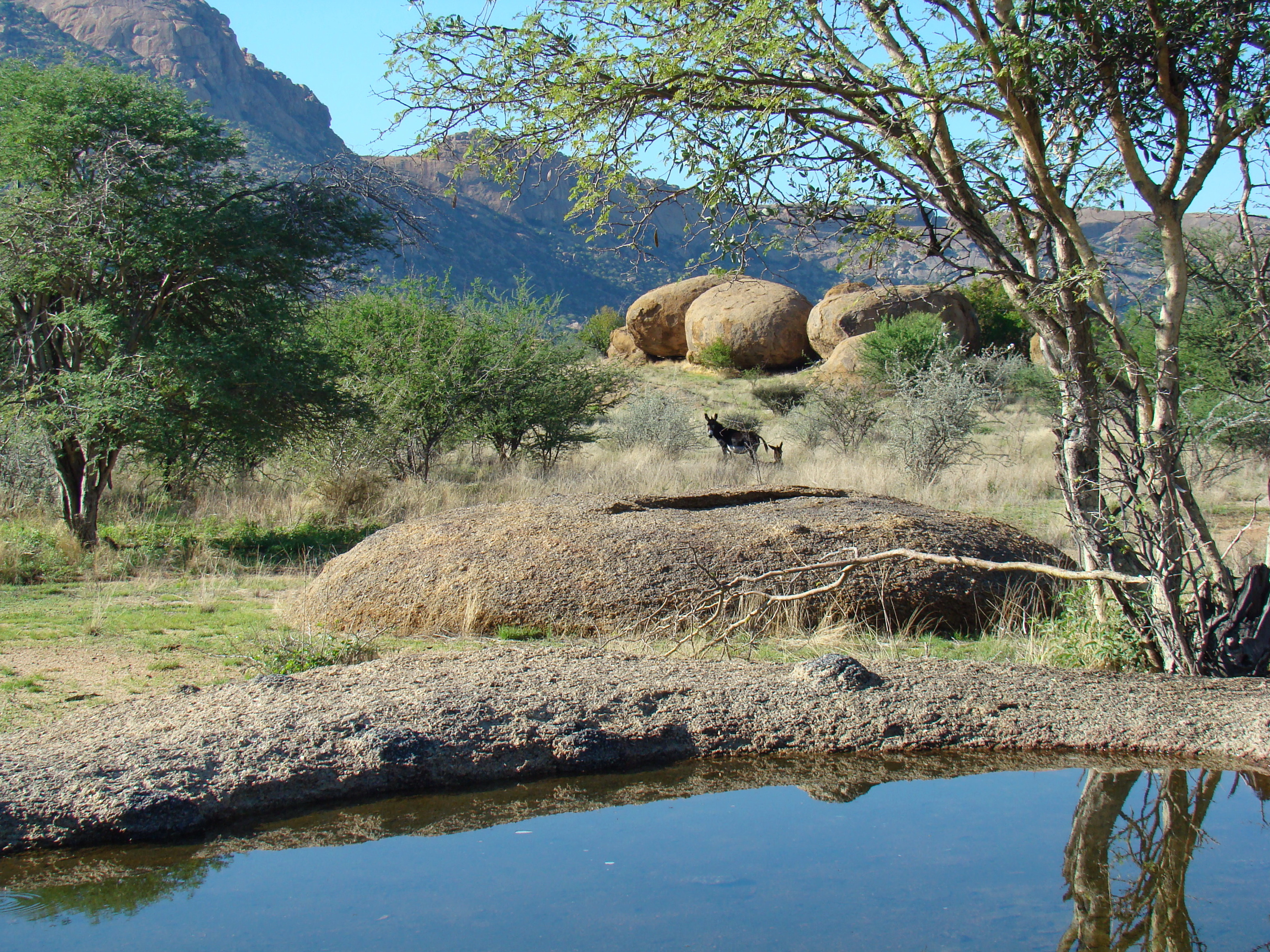 Подножья столовых гор Намибии. Март, 2012.